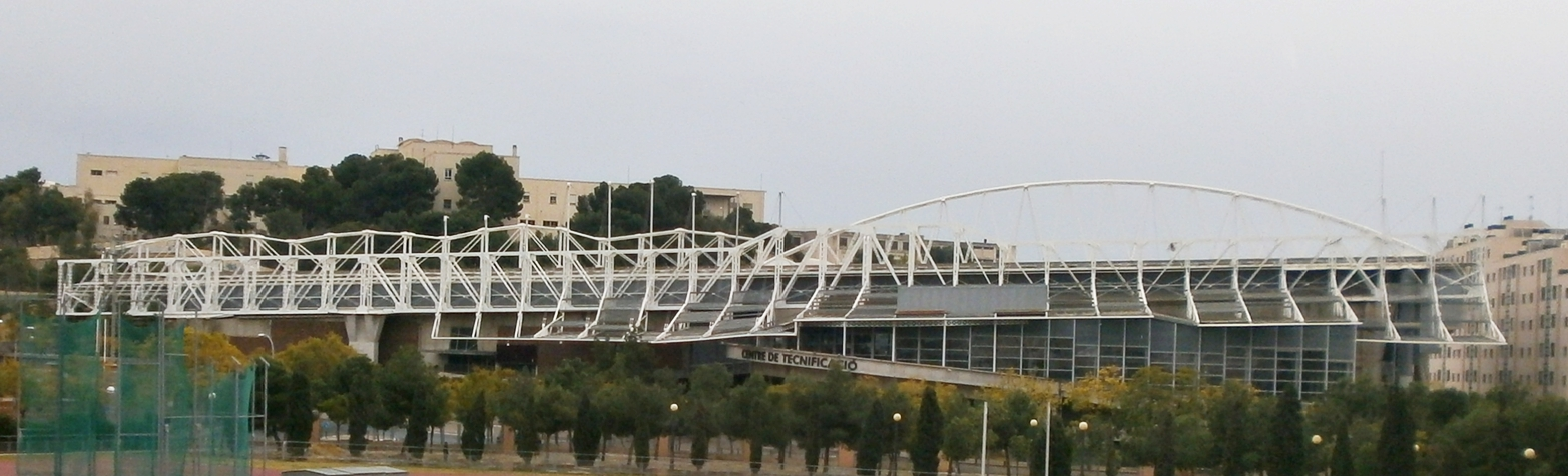 Centro de Tecnificación y Artes Gimnásticas, Alicante, España.